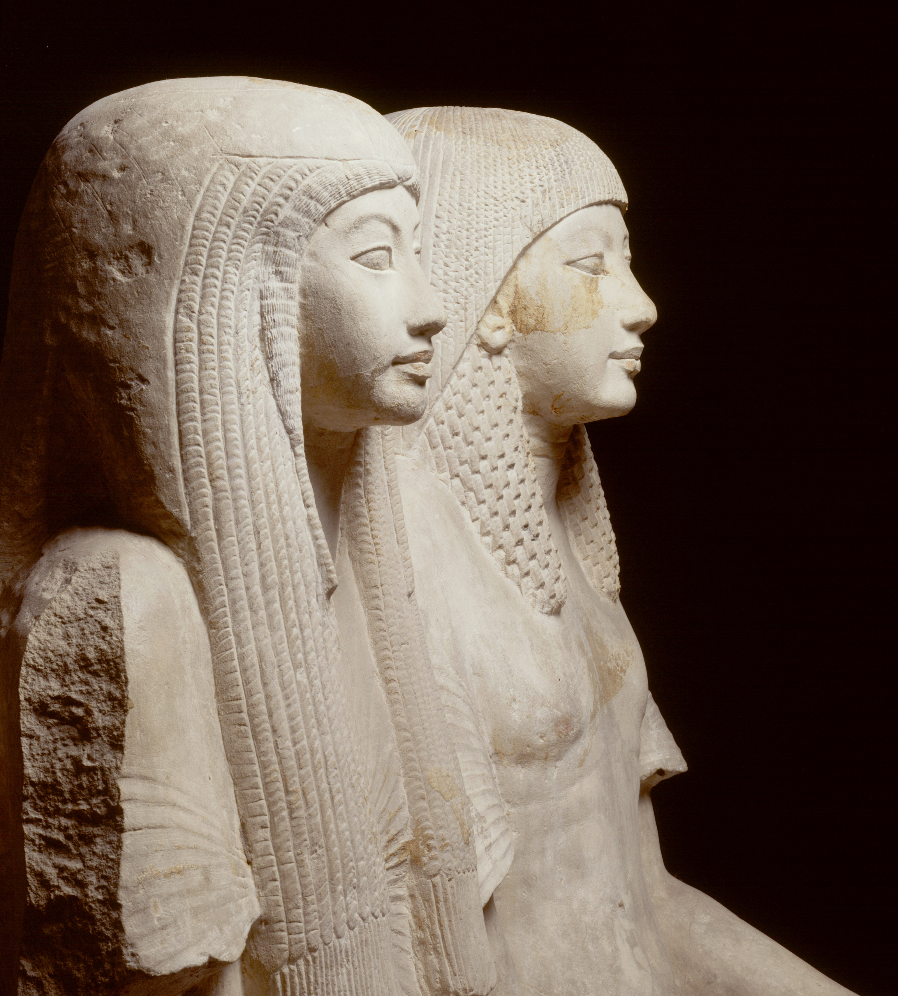 Dubbelbeeld van Maya en Merit uit ca. 1325 v.Chr. (hoogte: 158 centimeter)